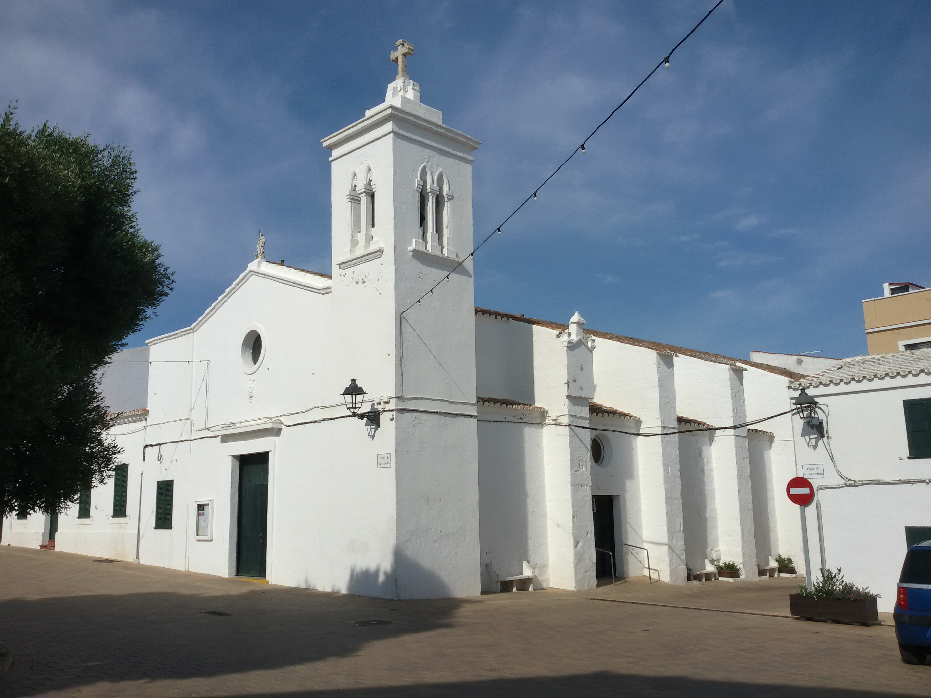 Iglesia de San Antonio Abad (Fornells)